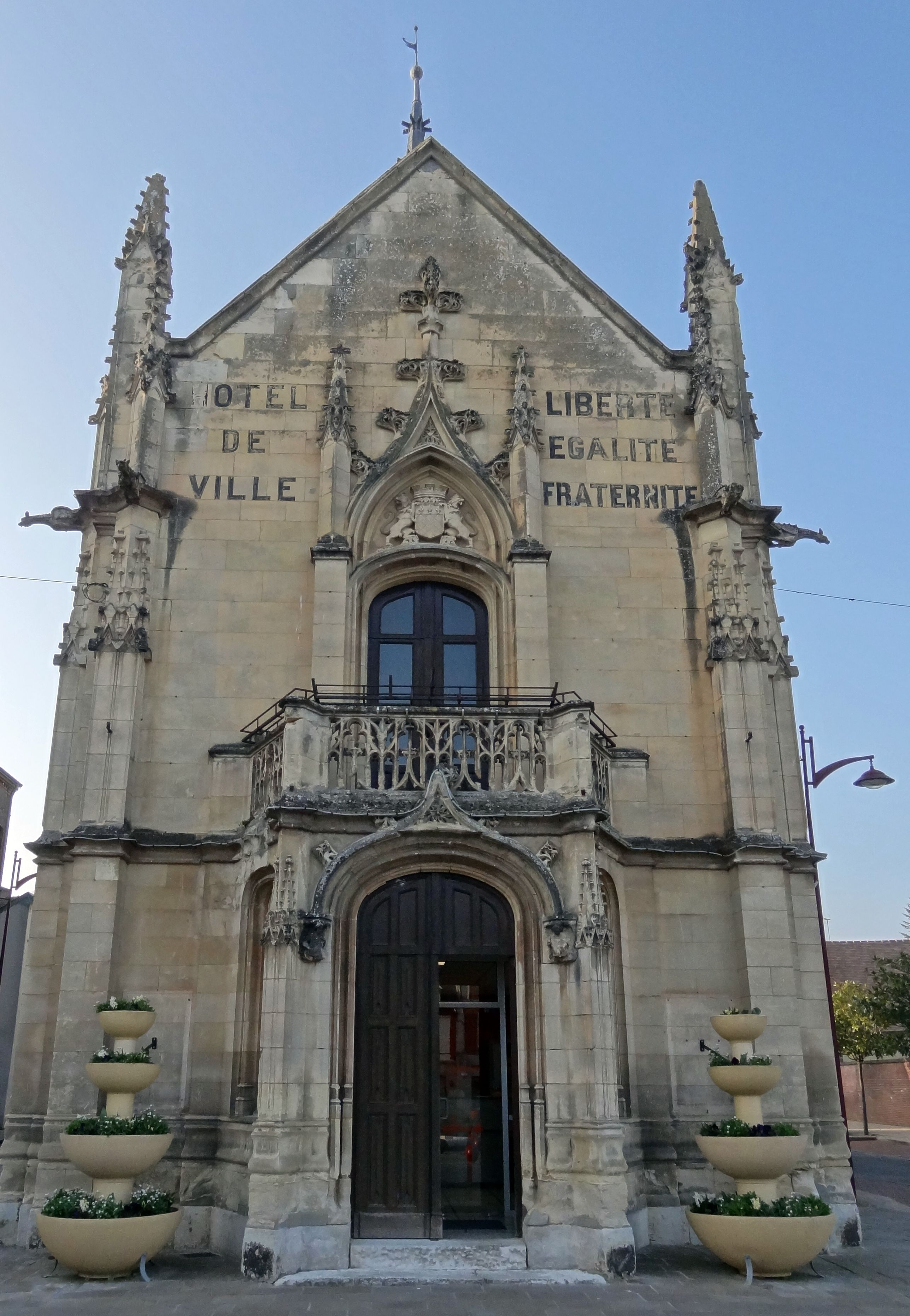 Mairie de Breteuil .